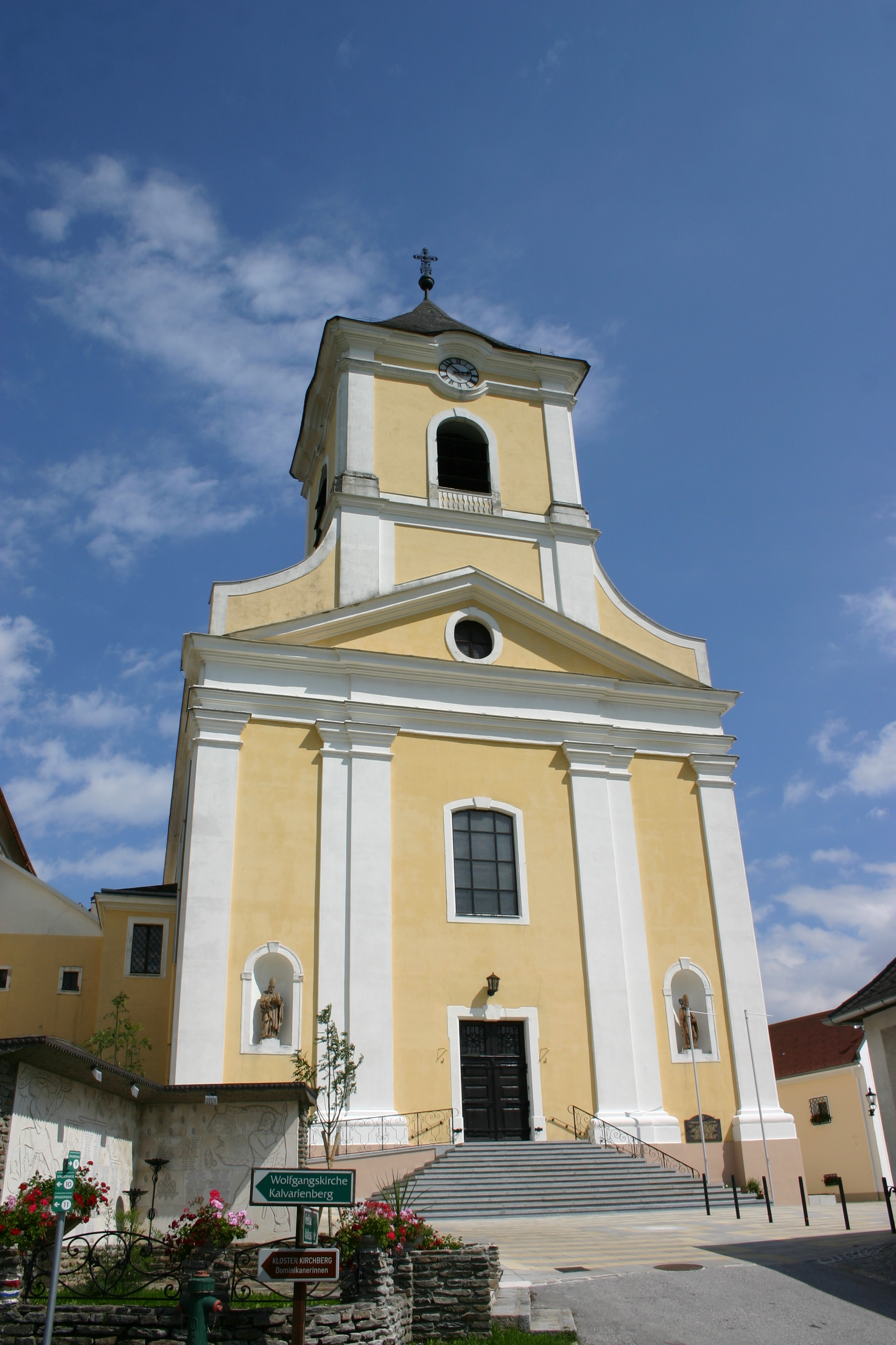 Kirchberg am Wechsel Pfarrkirche Sankt Jakob